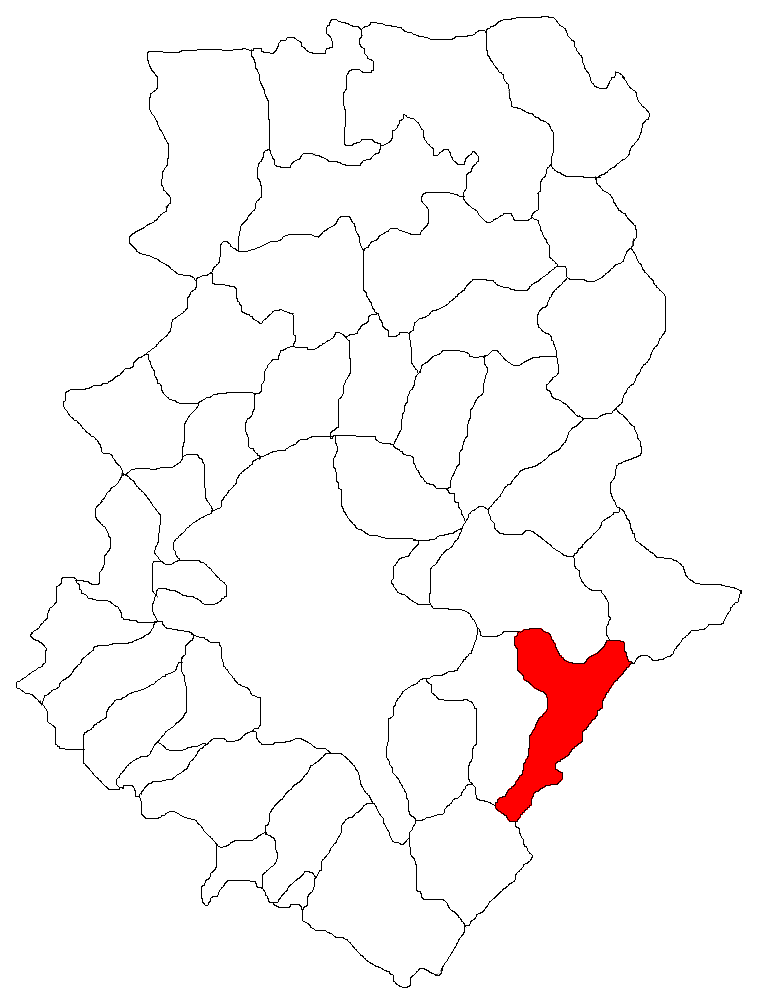 Categorie:Hărţi ale judeţului Ilfov